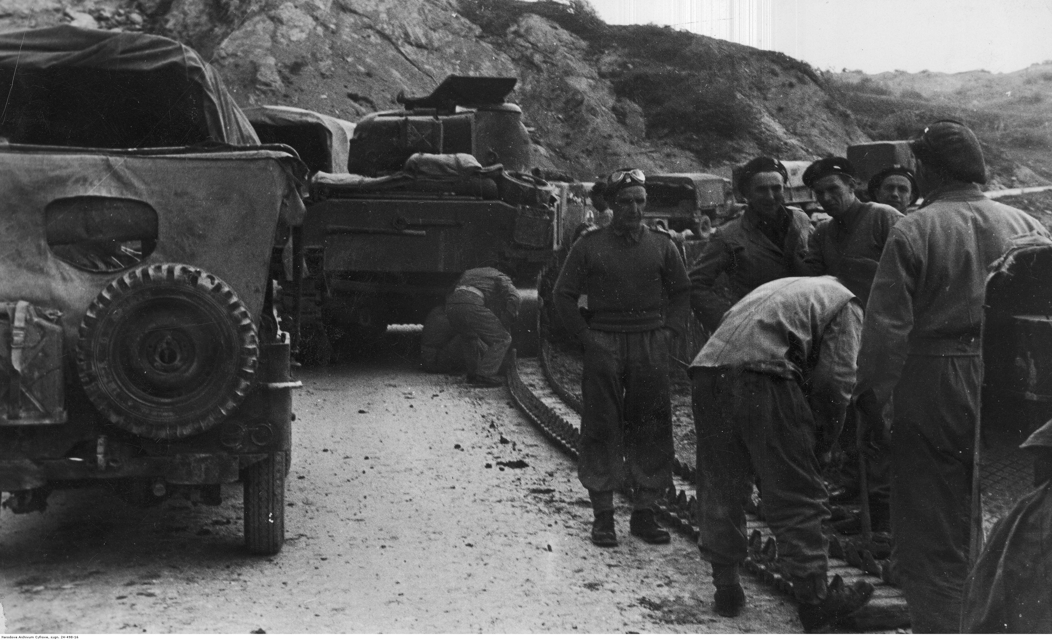 Przemarsz Samodzielnej 2 Brygady Pancernej podczas walk 2 Korpusu Polskiego w Apeninie Emiliańskim. Wymiana gąsienicy w czołgu M4 Sherman z 1 Pułku Ułanów Krechowieckich. Archiwum Fotograficzne Tadeusza Szumańskiego. Sygnatura: 24-498-16